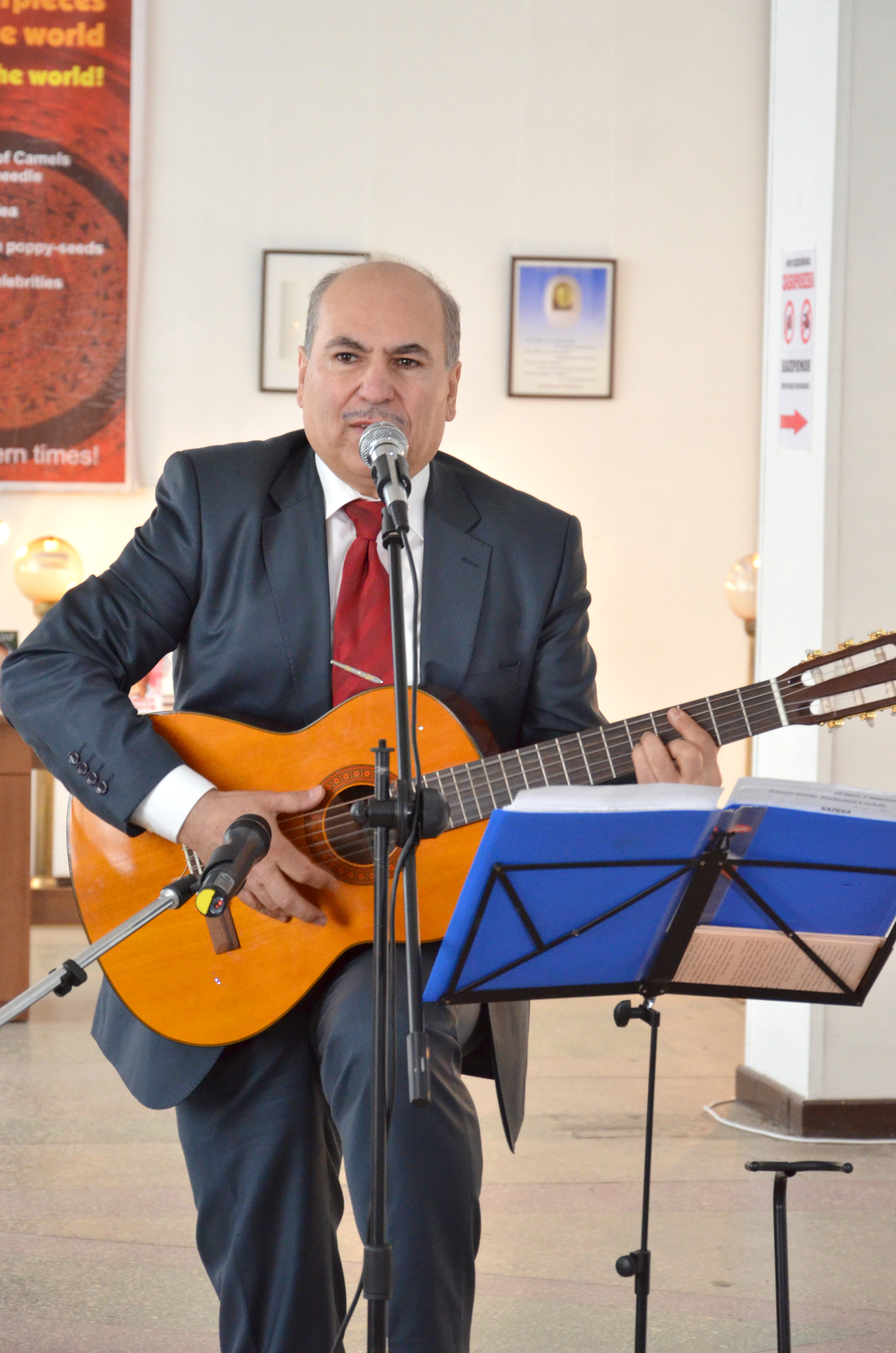 Український скульптор-мініатюрист вірменського походження, художник, філософ, бард, поет Володимир Казарян під час презентації виставки «Восьме диво світу» в картинній галереї м. Тернополя 17 березня 2016 року.